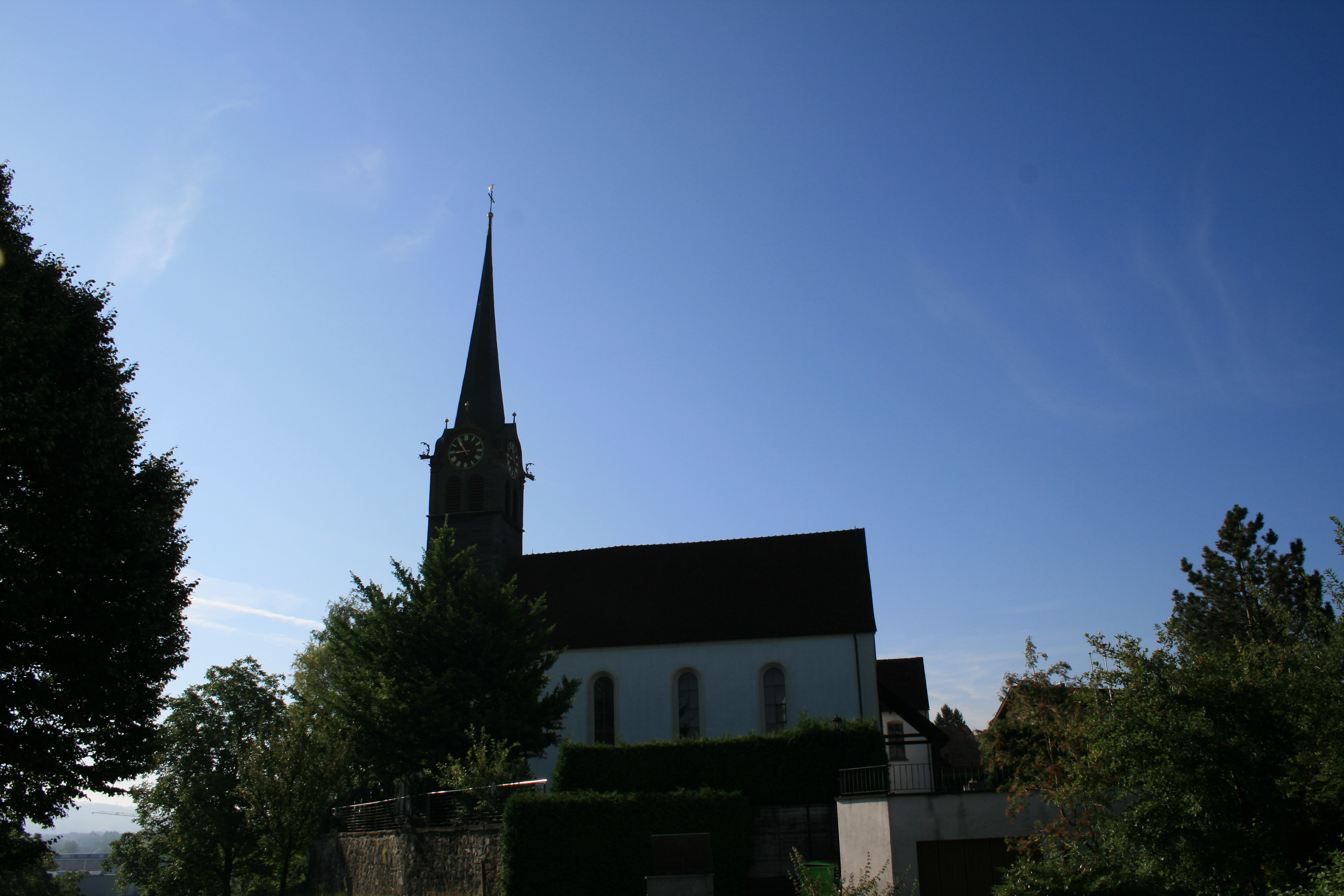 Church of Fischbach-Göslikon